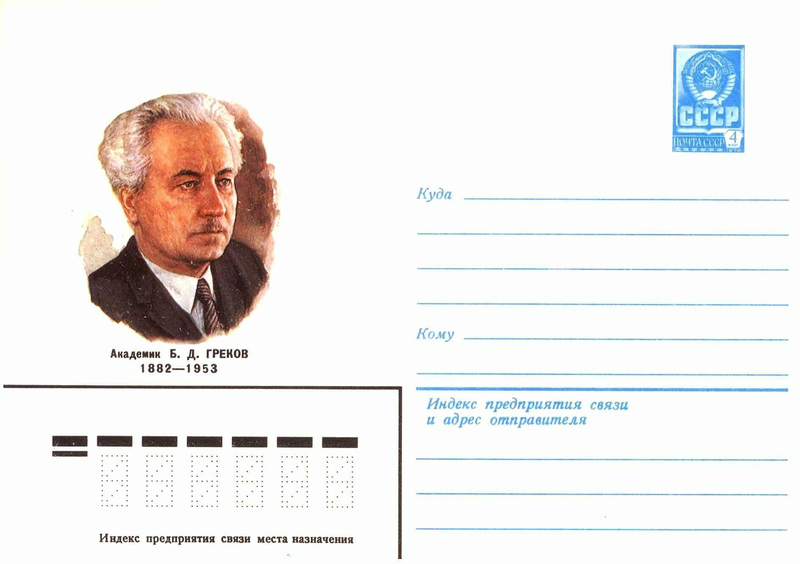 Художественные маркированные конверты 1982 года.